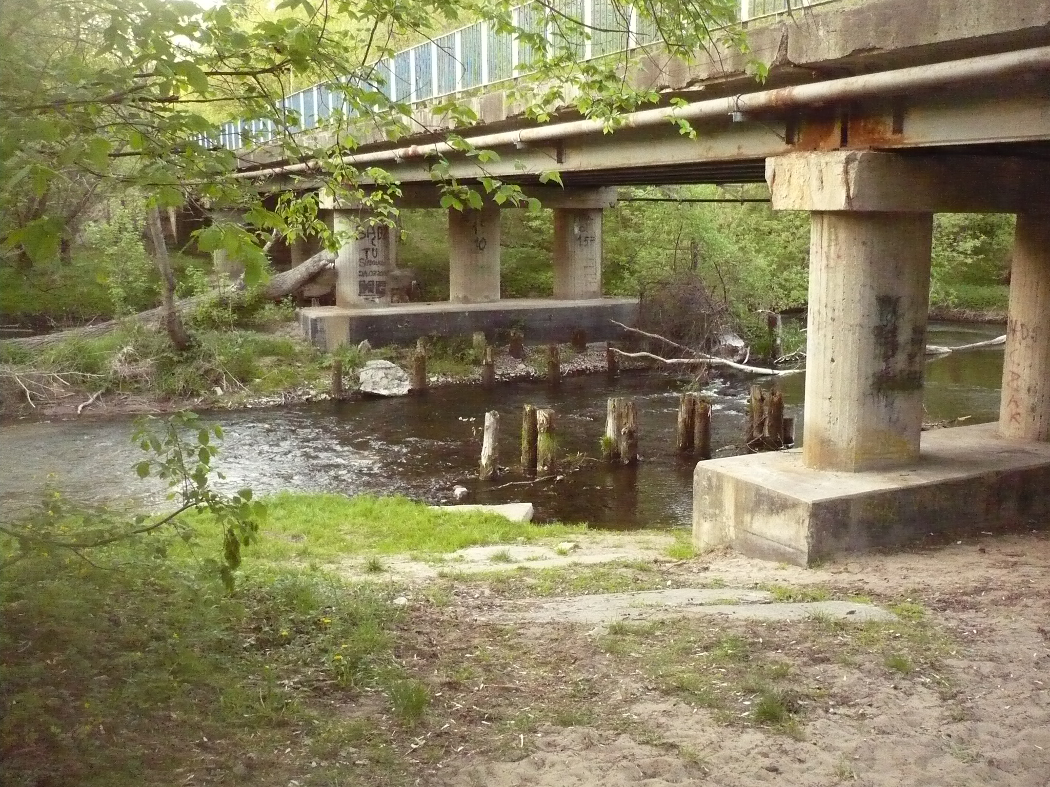 Most w dzielnicy Otwocka Mlądz